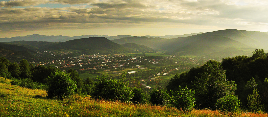 Панорама села Долгое